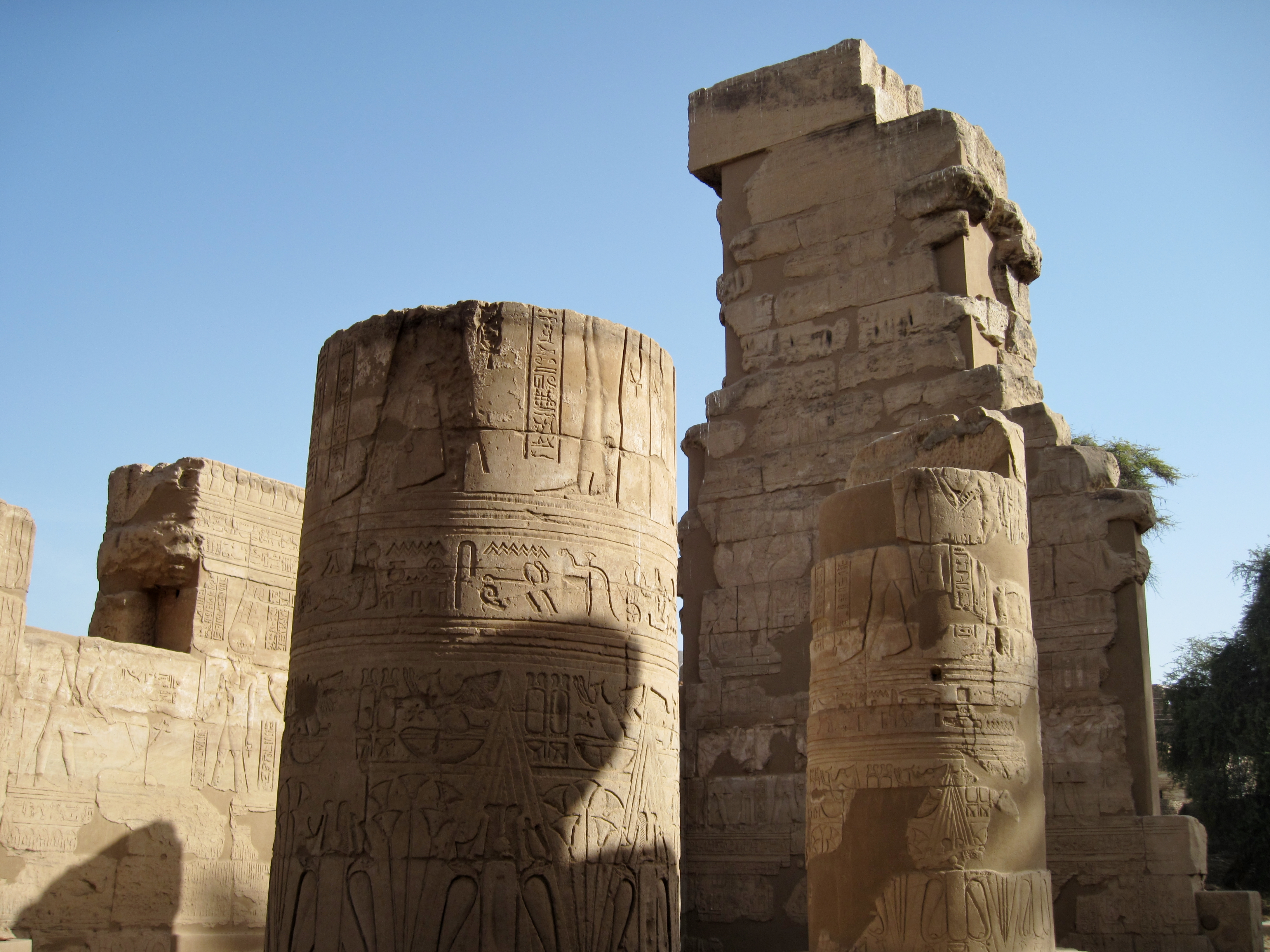 Innenraum des ptolemäischen Pronaos des Month-Tempels von el-Tod, Ägypten